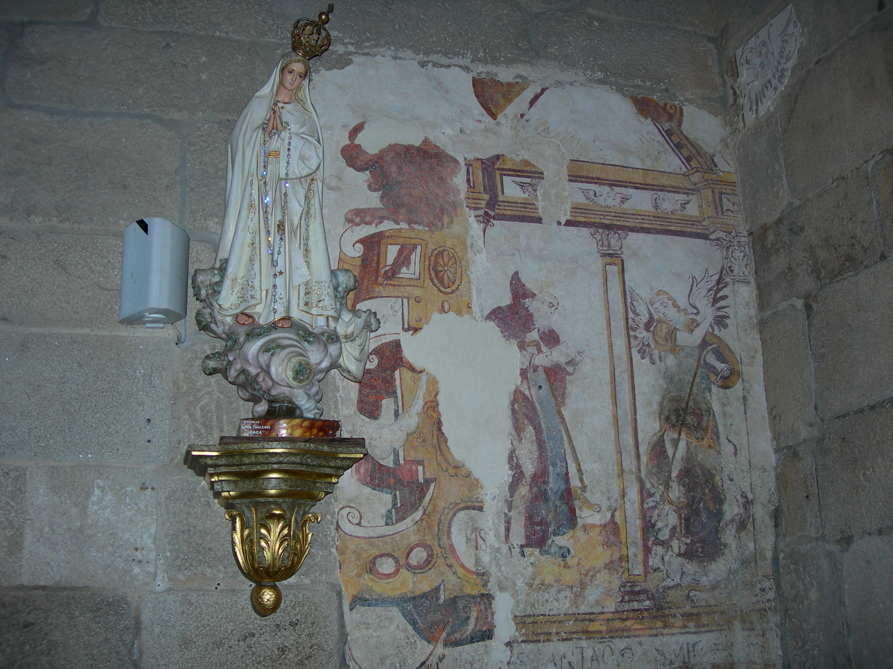 Igreja de São Pedro de Rubiães IX This file was uploaded for Wiki Loves Monuments in Portugal with the unique identifier 71137.